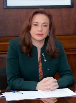 Cancillería del Ecuador Reunión con AFESE